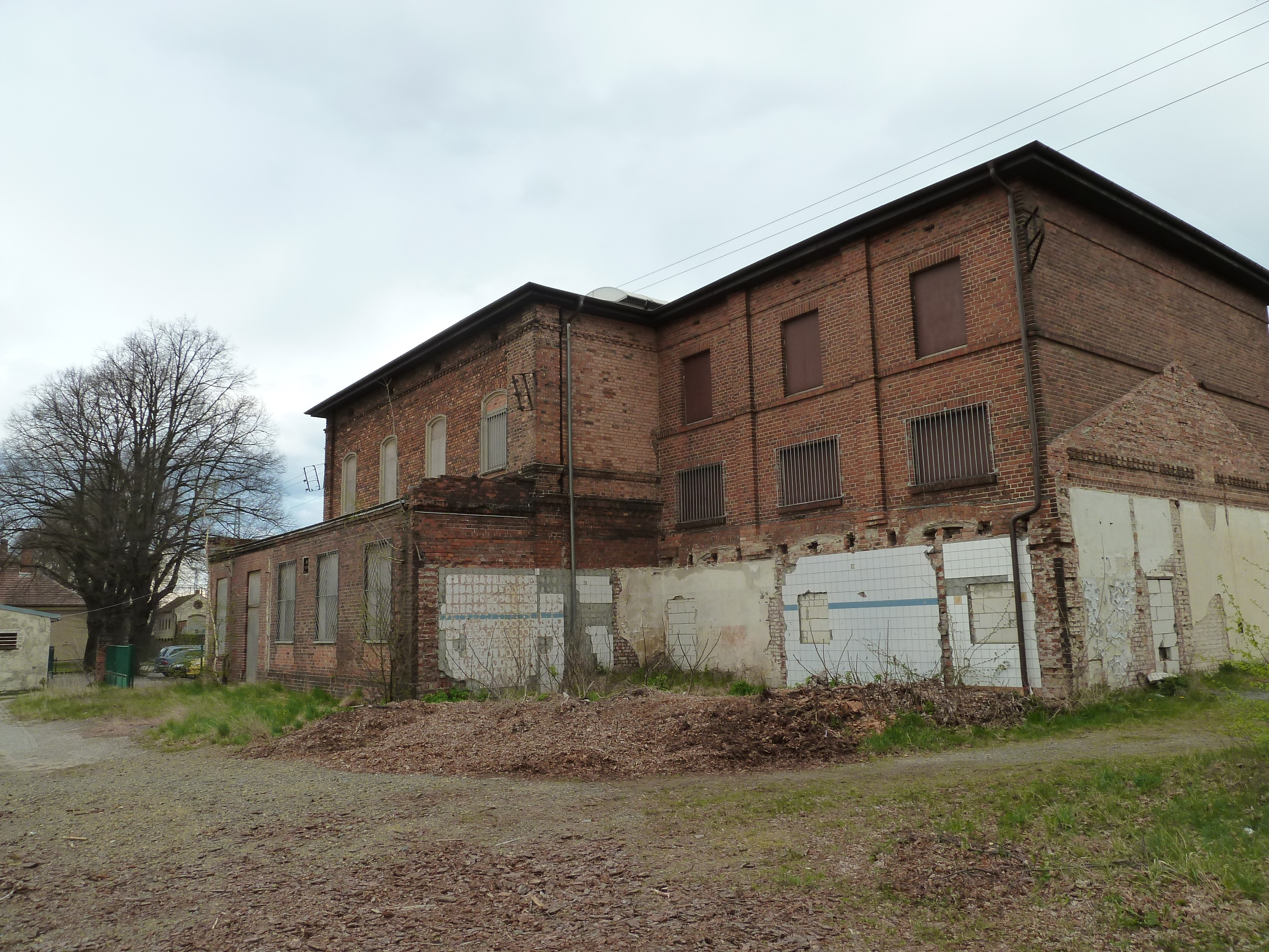 Bahnhof Ruhland, Kulturdenkmal, Rückseite